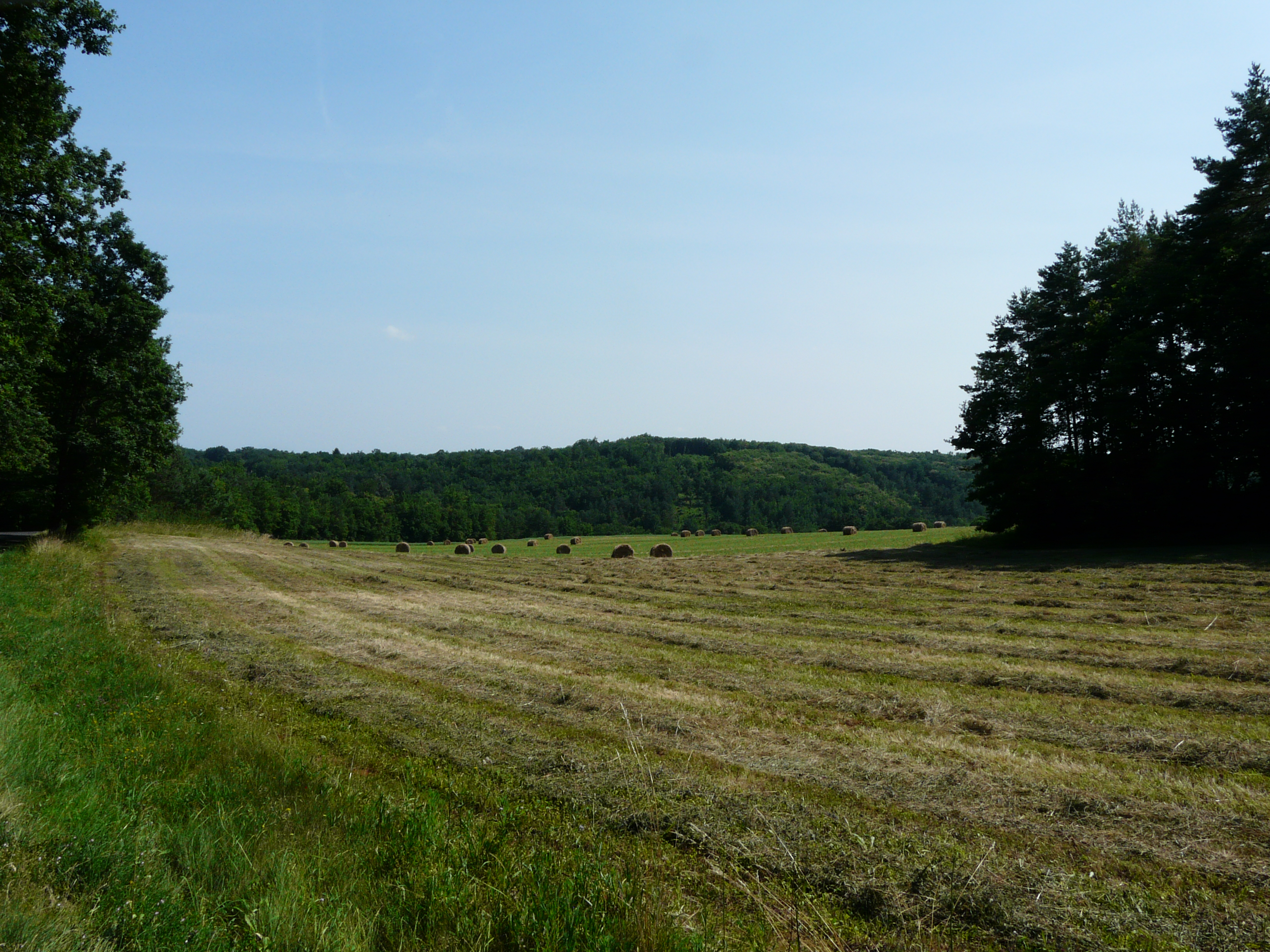 Près du lieu-dit le Petit Mas, la ligne d'arbres marque la vallée du Caudeau entre les communes de Veyrines-de-Vergt (au premier plan) et de Sainte-Alvère (au fond), Dordogne, France.